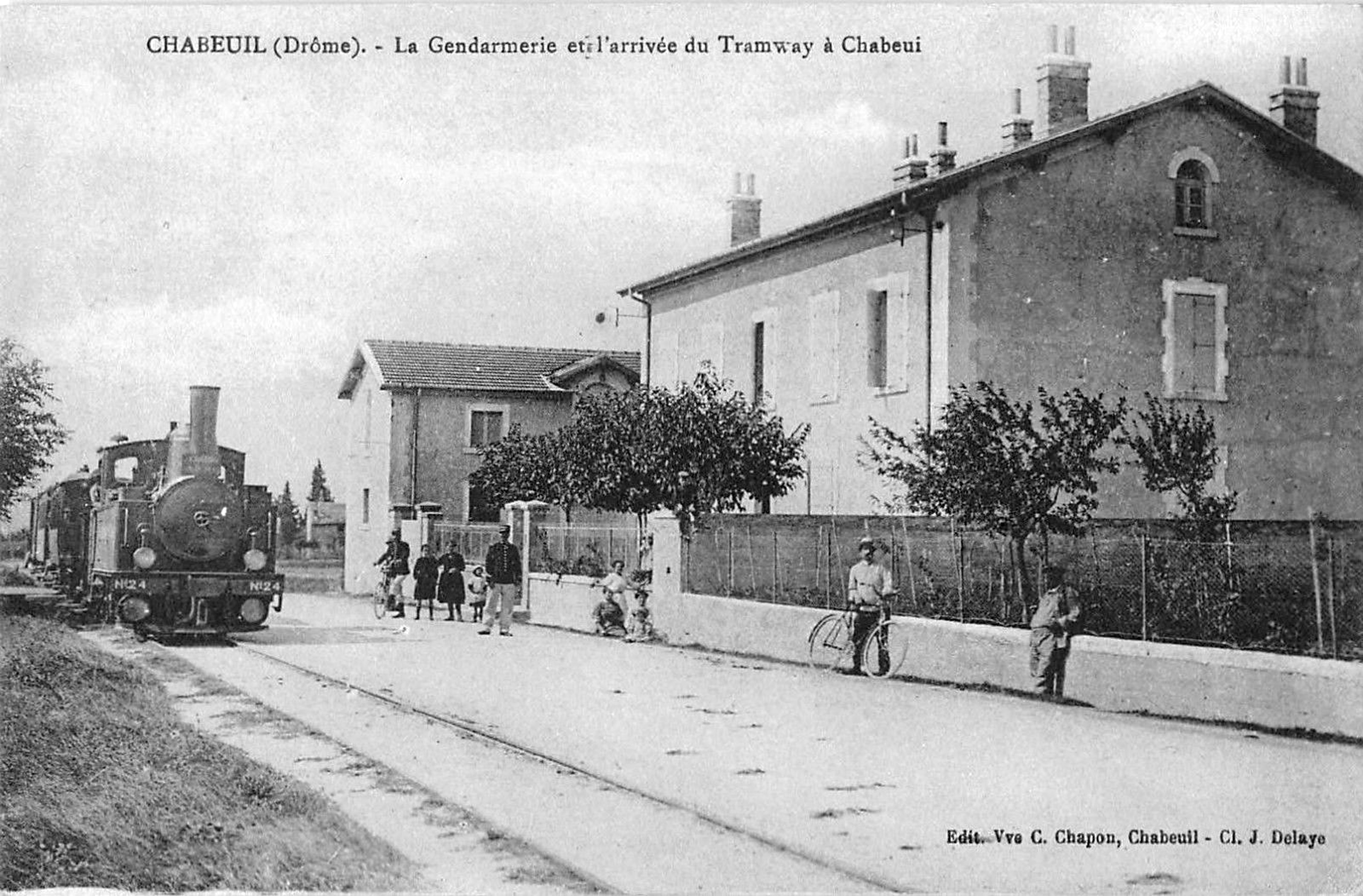 Chabeuil